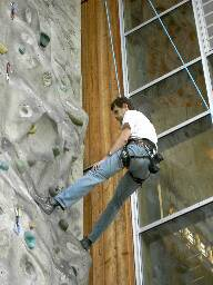 Abseilen einer Person - mit eigner Kamera aufgenommen . GNU-FDL